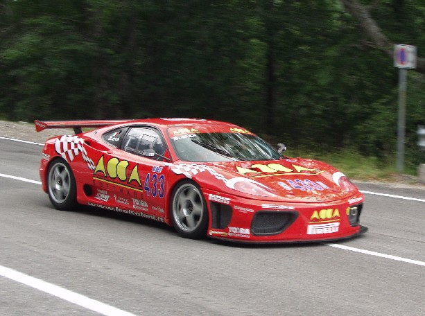 Ferrari 360 - La foto è stata scattata il 5.7.03 alla Rieti-Terminillo (Coppa Carotti)